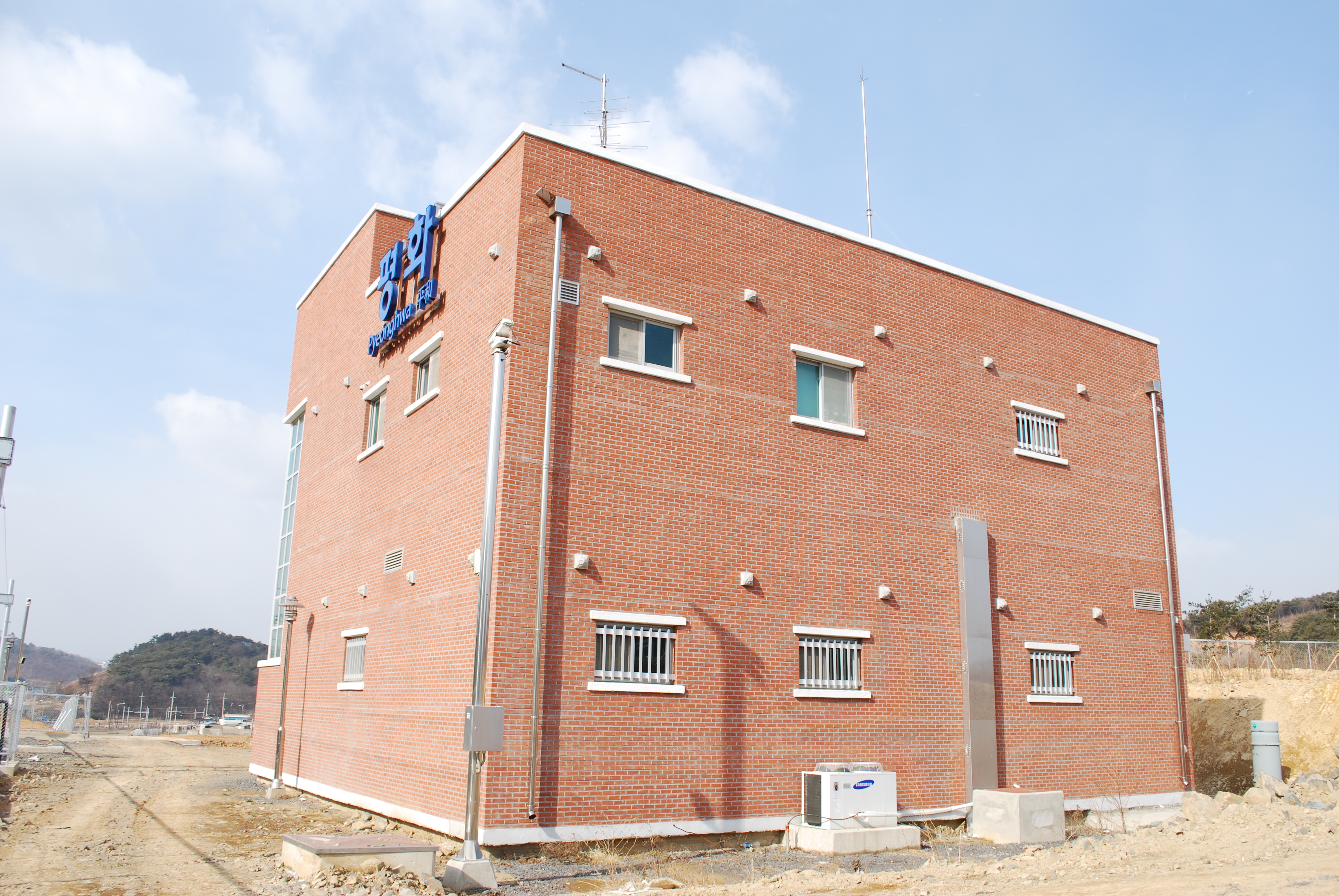 새로운 평화역 역사